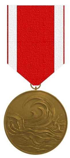 Avers der Niedersächsischen Gedenkmedaille aus Anlass der Sturmflutkatastrophe 1962